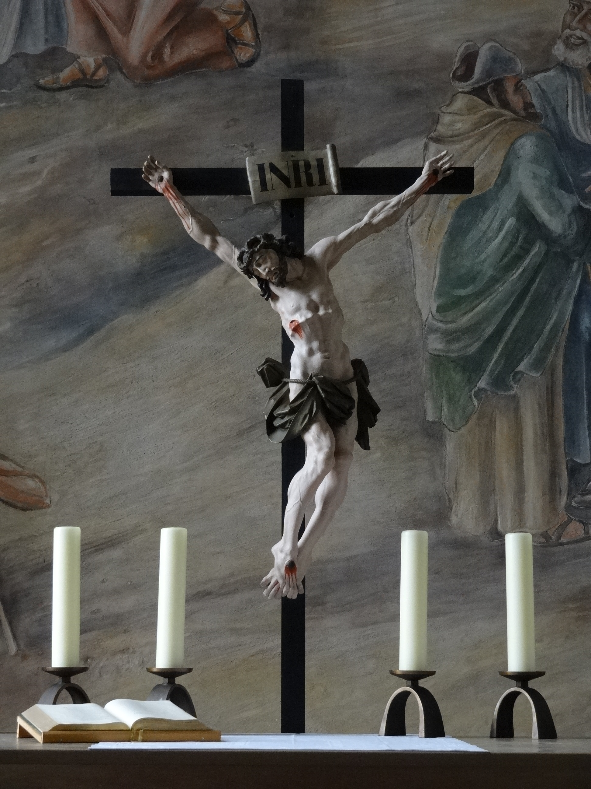 Evangelische Kirche Watzenborn-Steinberg